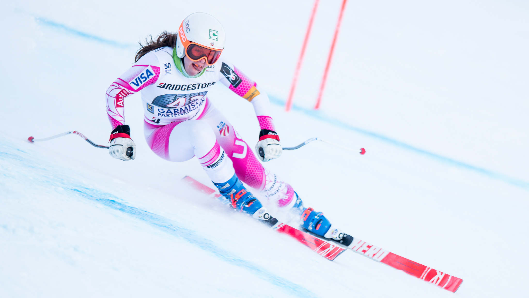 64. Kandahar Rennen,Audi FIS Ski Weltcup Garmisch-Partenkirchen,Damen Abfahrt,Kandahar,Ladies Downhill,Leanne Smith